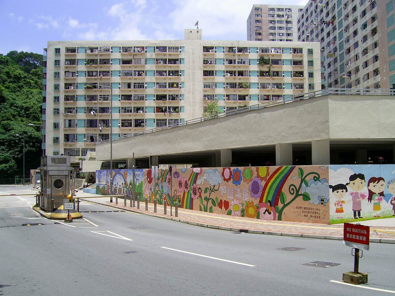 中文（香港）: 梨木樹(二)邨第1座